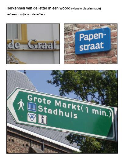 Werkblad voor het oefenen van visuele discriminatie.